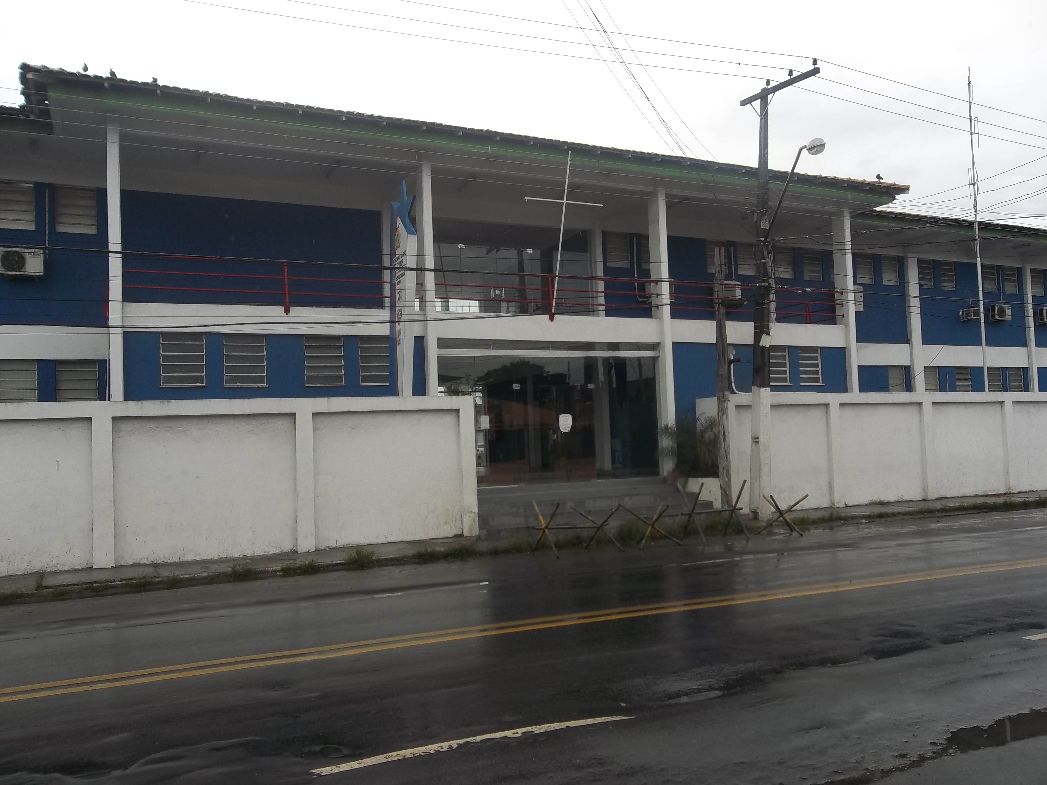 27º Distrito Integrado de Polícia no bairro Amazonino Mendes, em Manaus, Amazonas, Brasil.